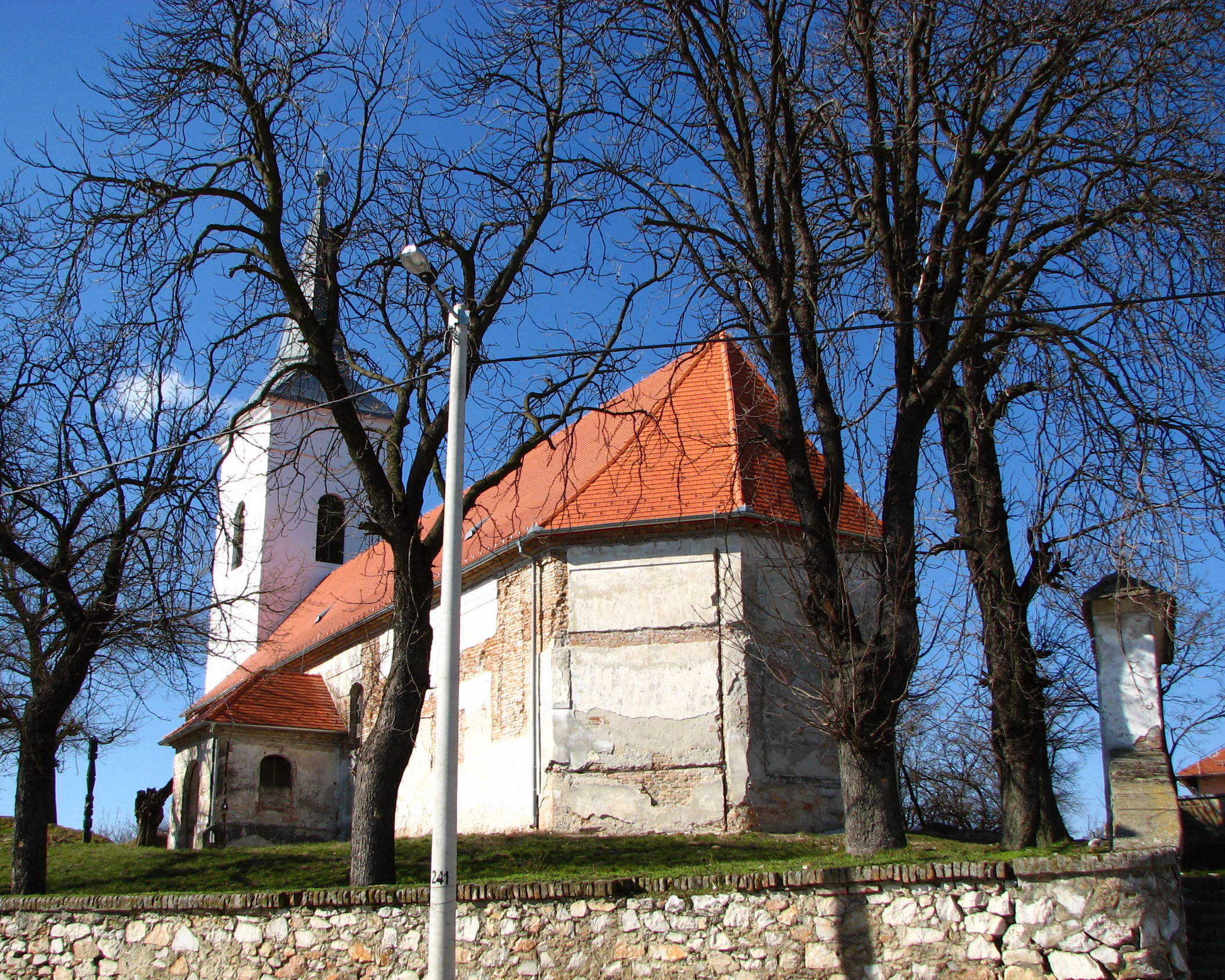 Протестантска црква у Кнежевим Виноградима, Аутор: Бранко Тодоровић